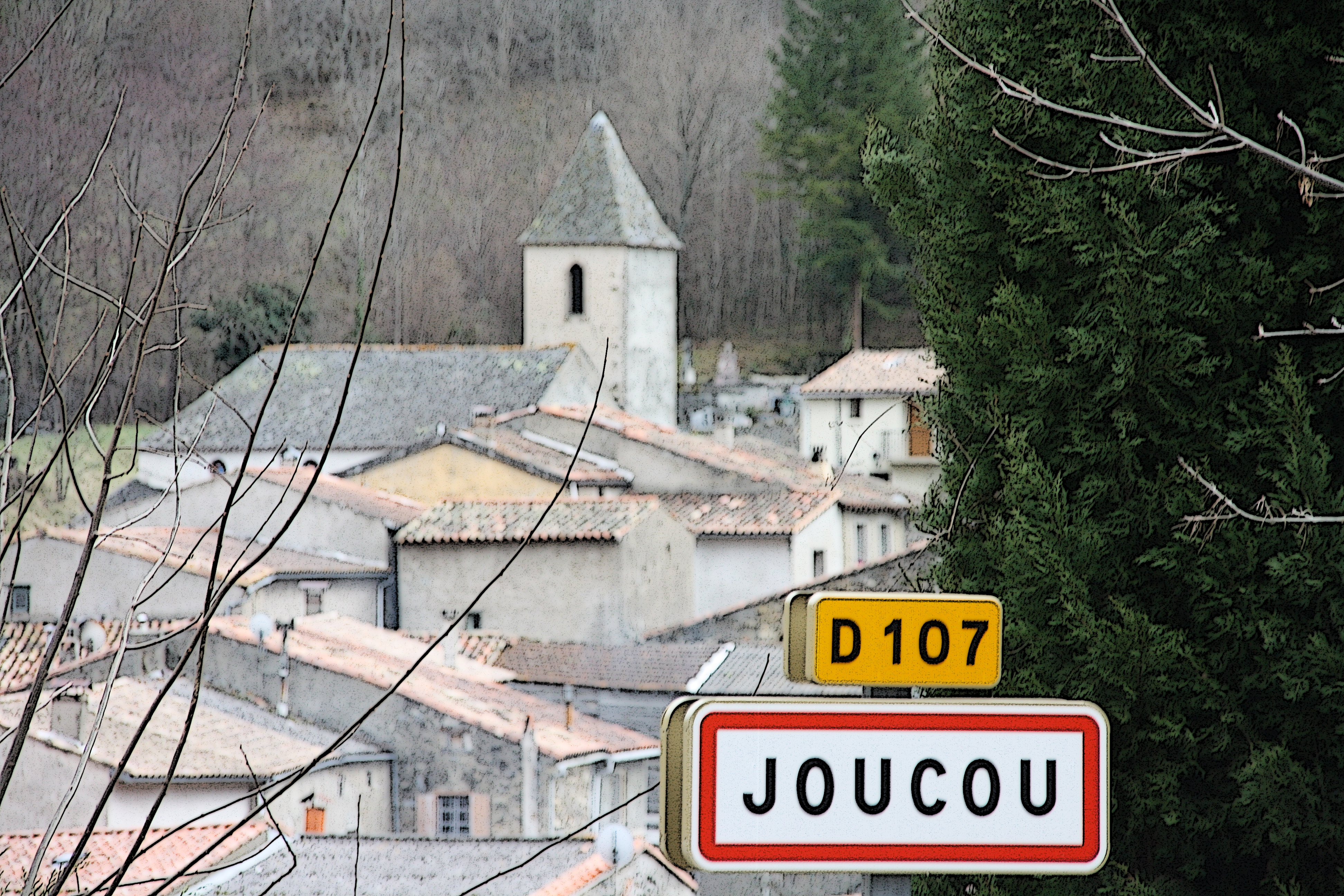 au détour d'une balade